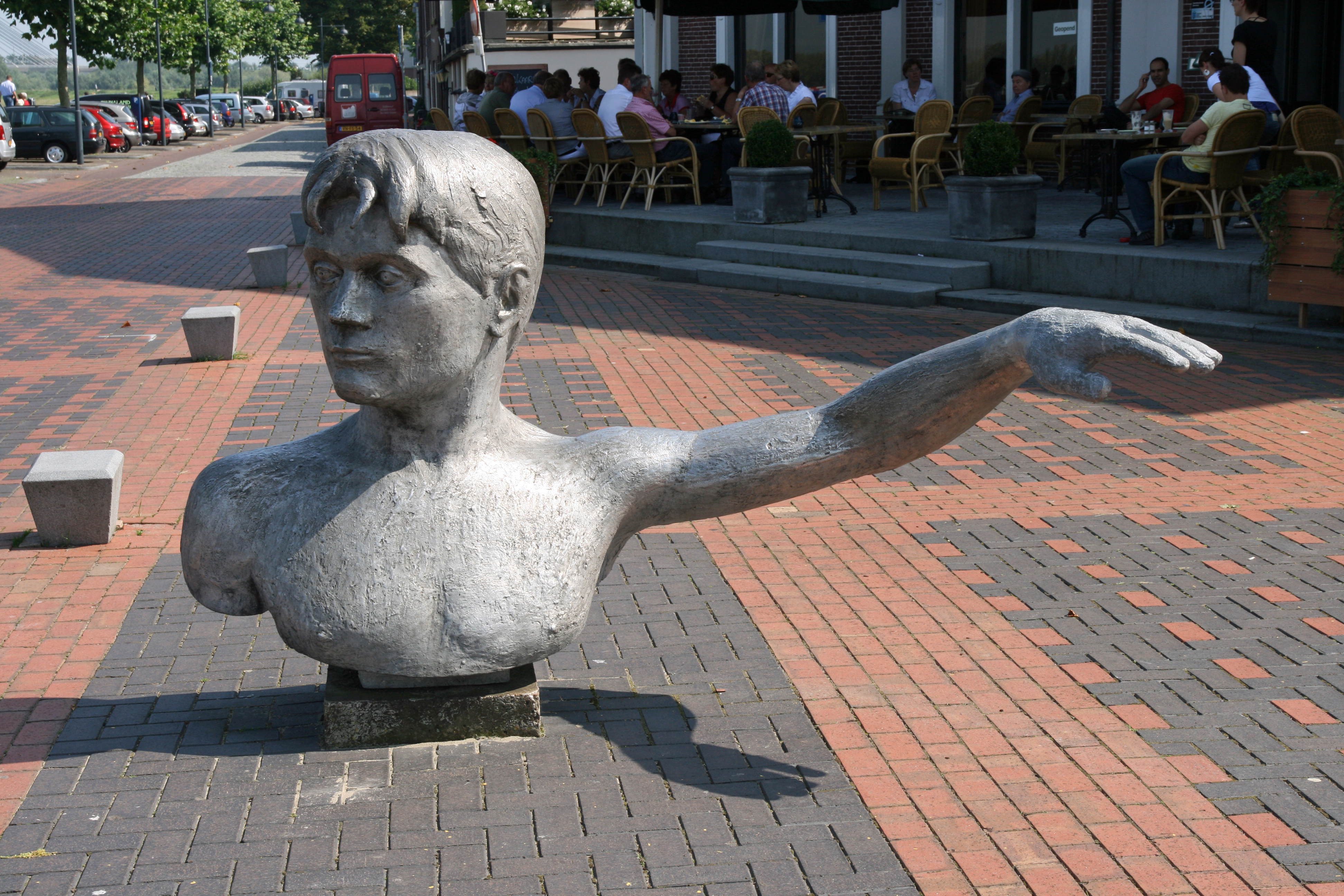 Deze jongeman (van beeldend kunstenaar Marcel Smink) geeft met z'n linkerhand aan de hoogte van de waterstand waarop de waterkering van Zaltbommel is ontworpen: 8.87 m boven NAP (in 1995 stond het water op een niveau van 7.43 m + NAP).